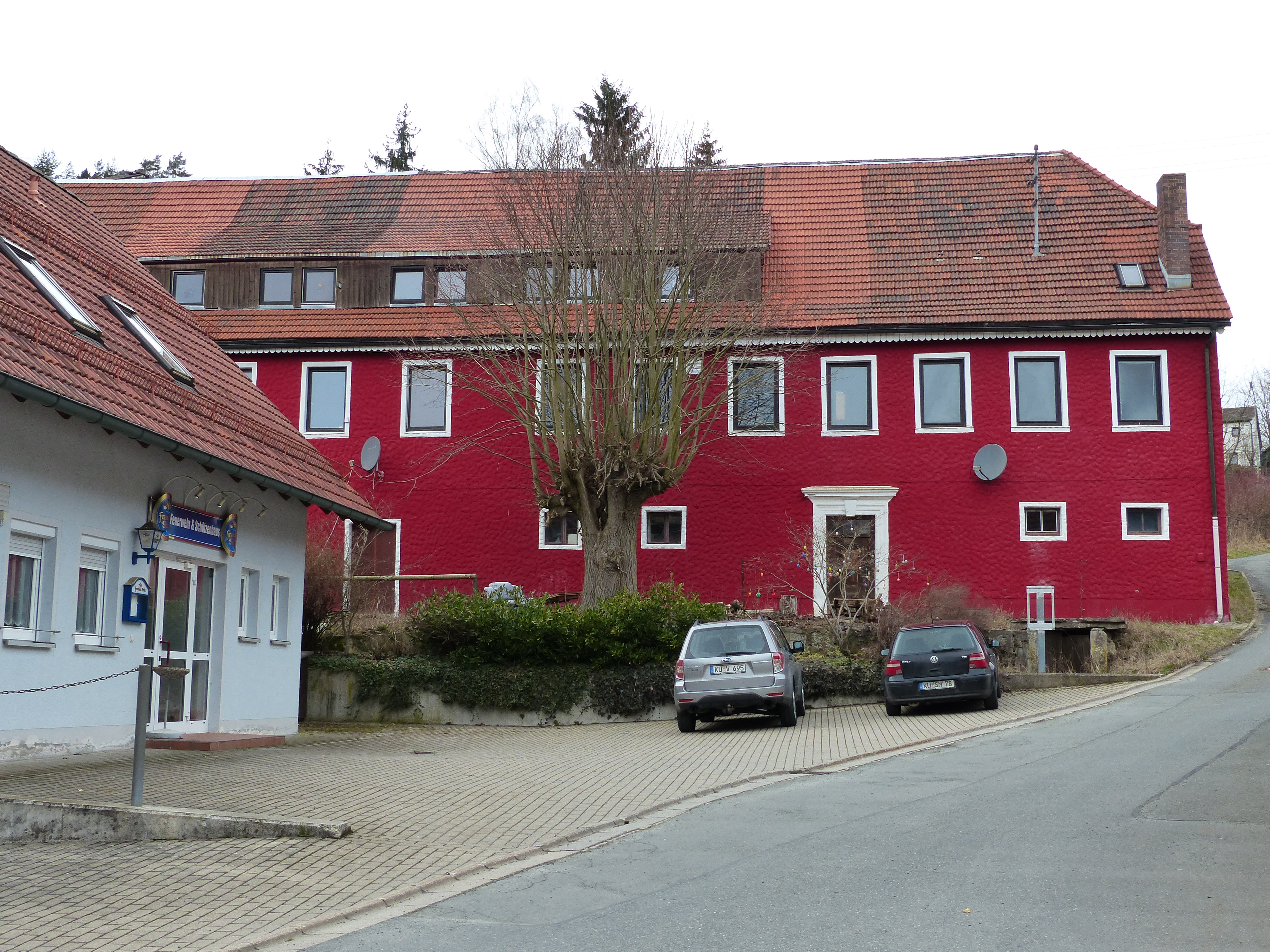 Schloss